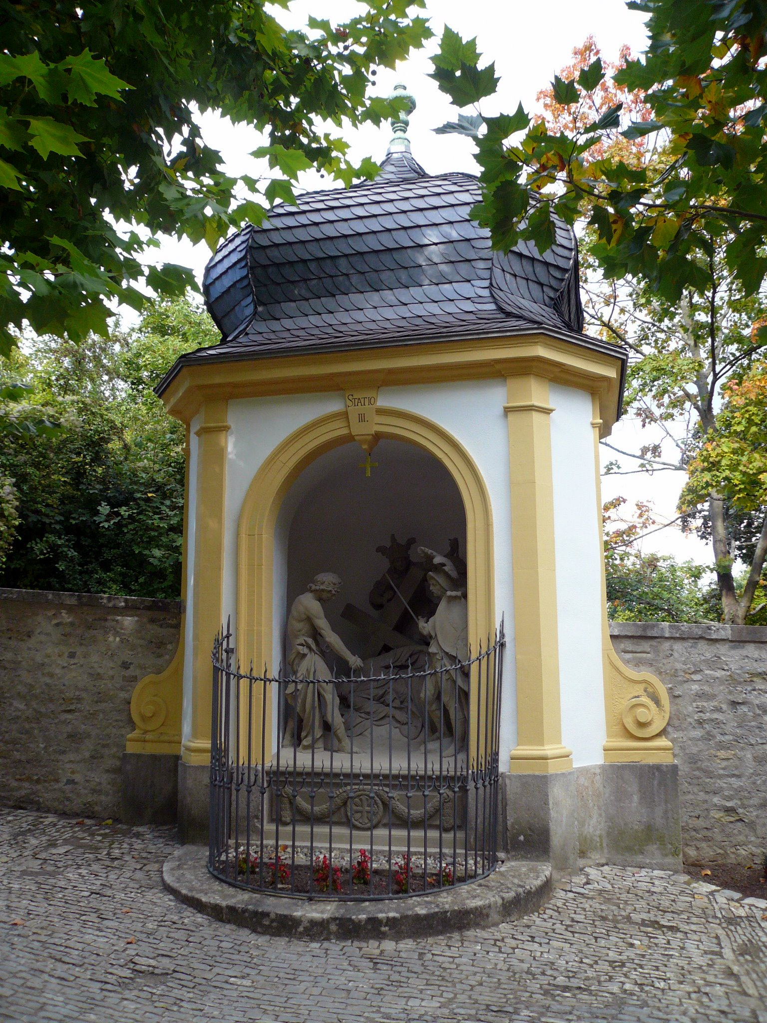 Käppele, Kreuzweg